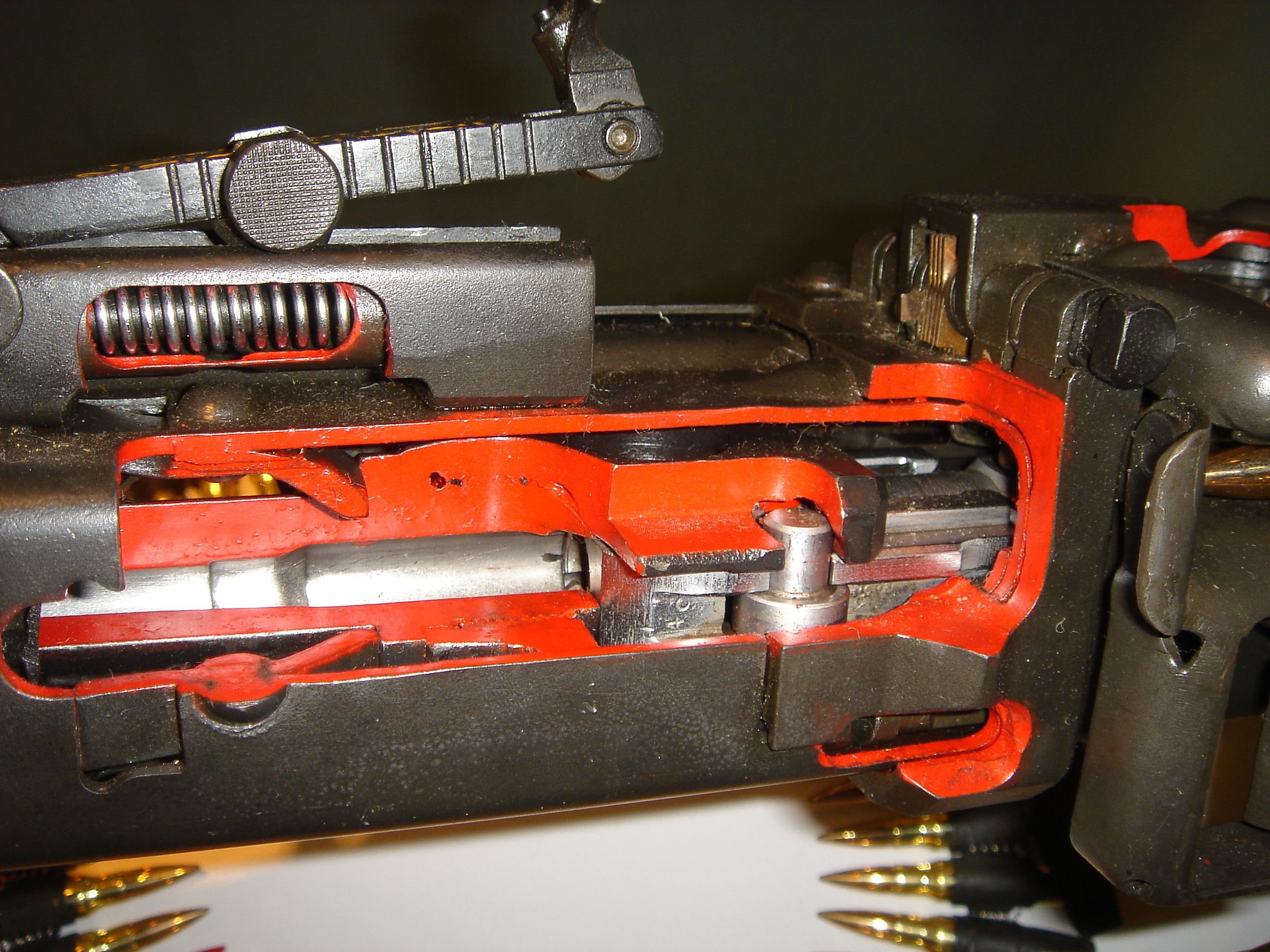 MG 42 delayed roller locking system